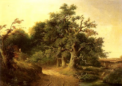 Ongeveer 400 jarige zgn. Wodanseiken te Wolfheze, geschilderd in 1849 door J.J. Cremer